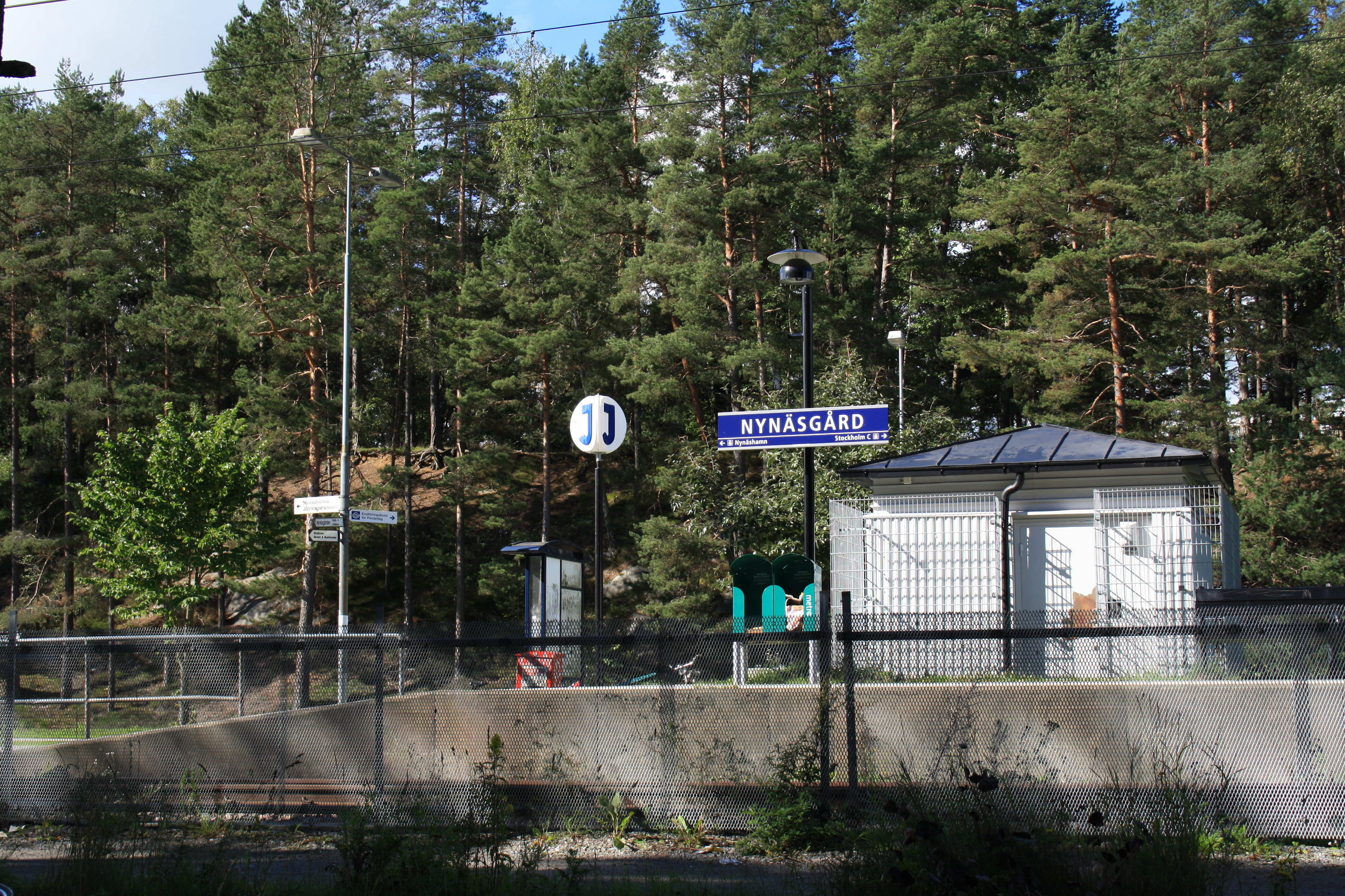 Nynäsgårsd pendeltågstation, fotograferat mot Backlura